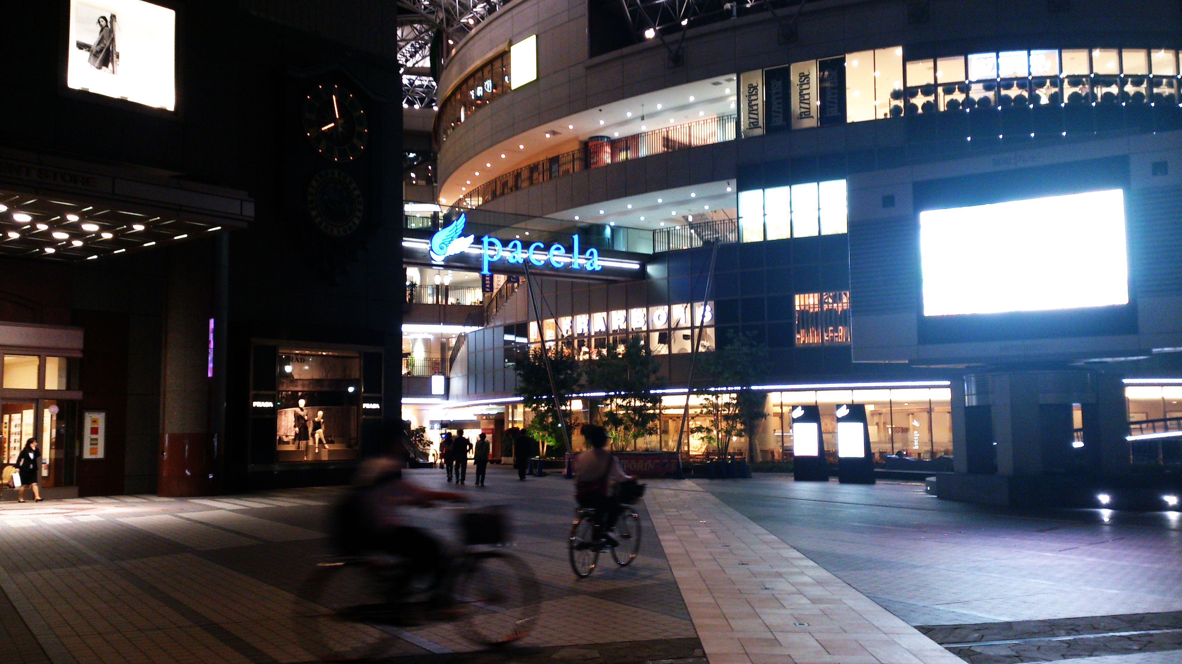 Hiroshima Sogo 廣島崇光百貨